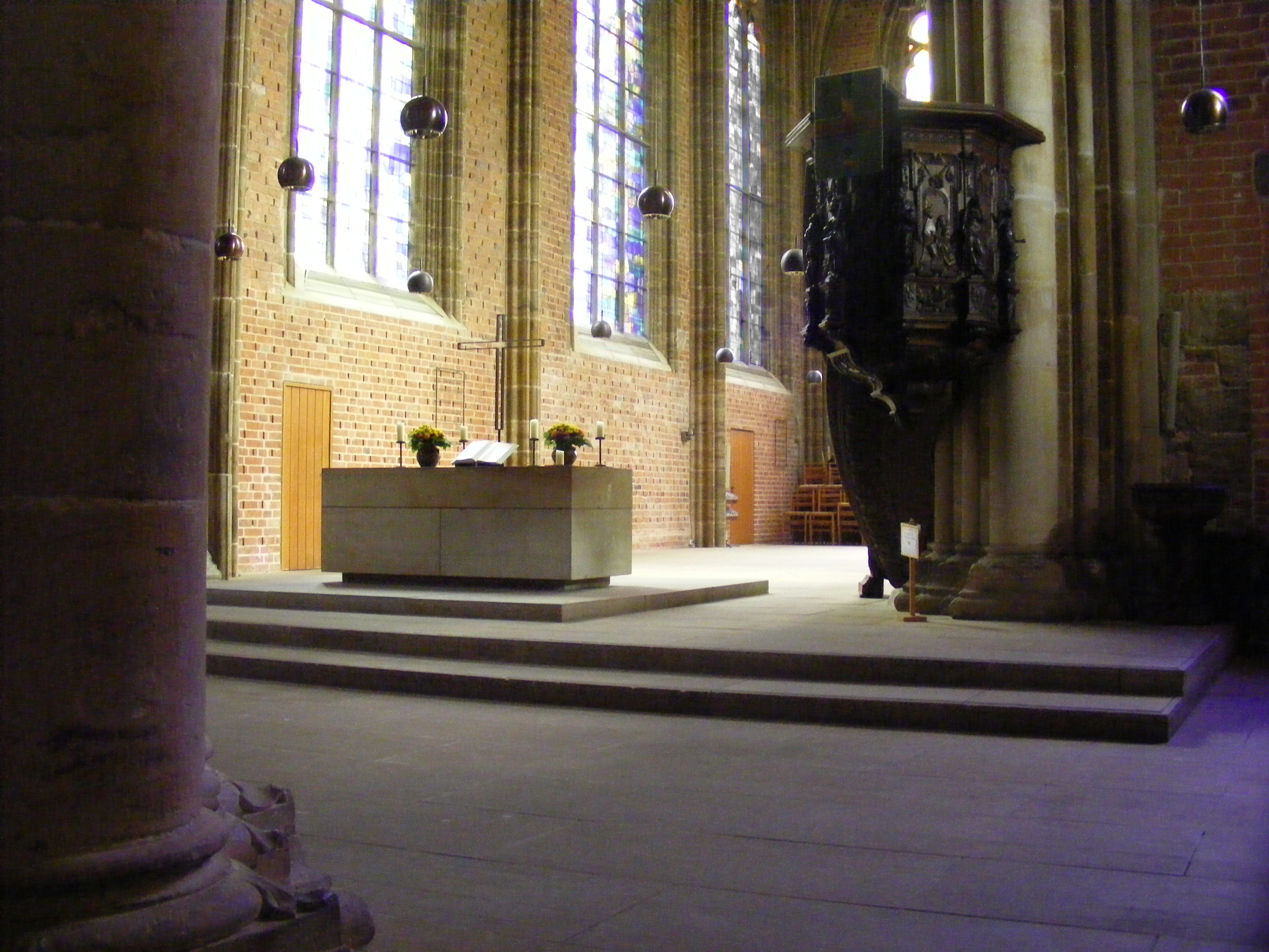 Pulpit, altar and choir of Kirche Unser Lieben Frauen (Our Dear Lady`s Church) in Bremen